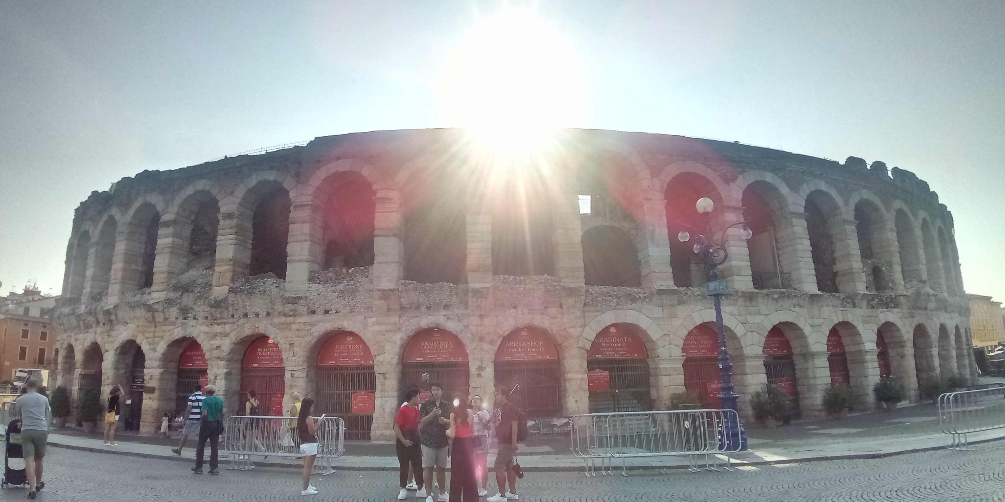 Arena di verona